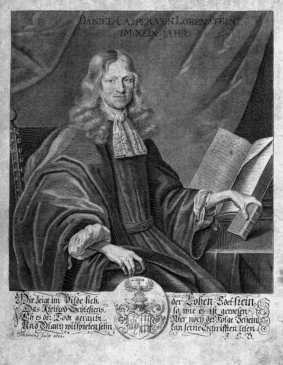 Daniel Casper von Lohenstein im XLIX Jahr, Autorenportrait aus: Großmüthiger Feld-Herr Arminius oder Herrmann, Leipzig 1731.